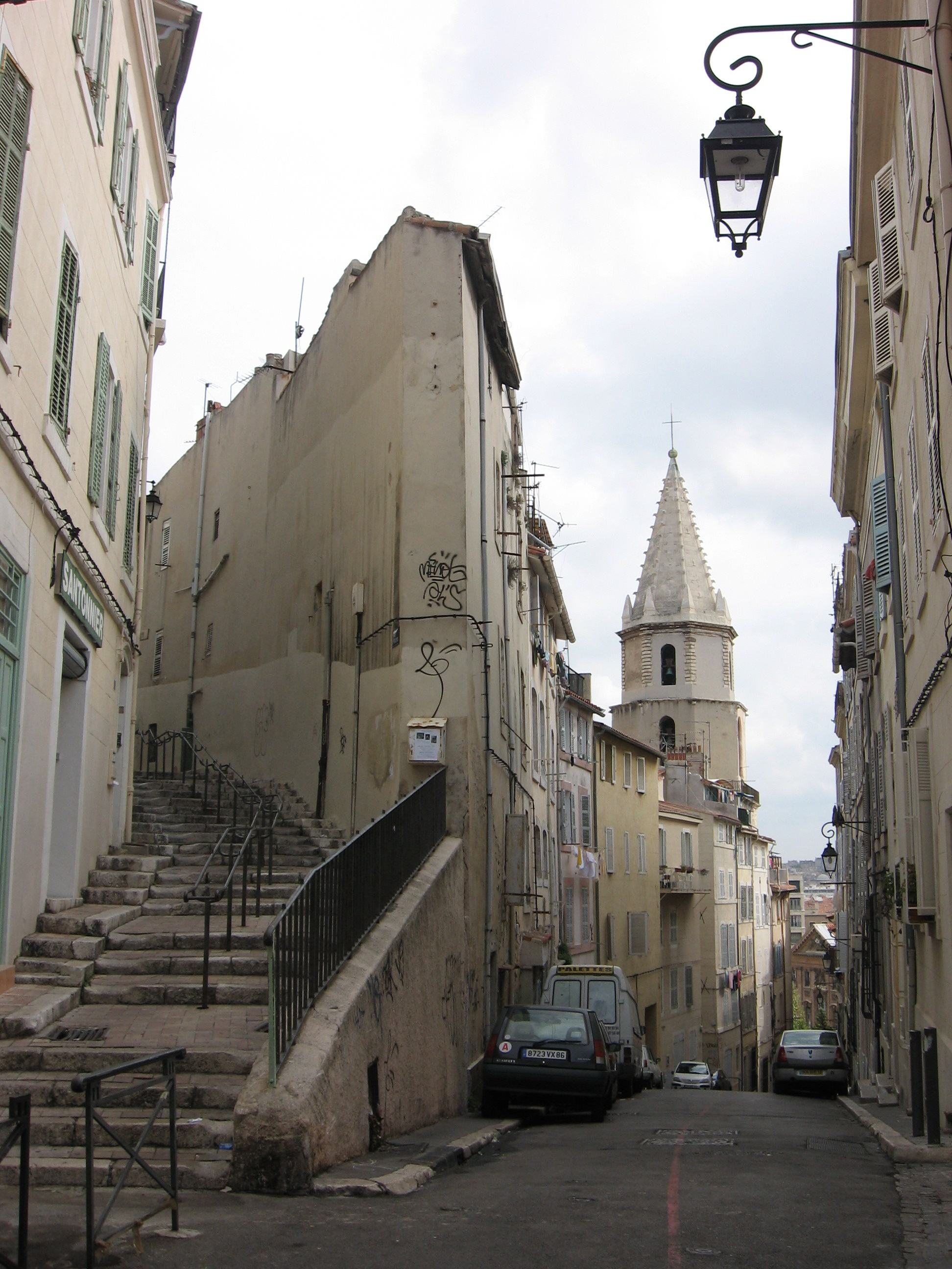 Montée des Accoules, Le Panier, à Marseille (France)